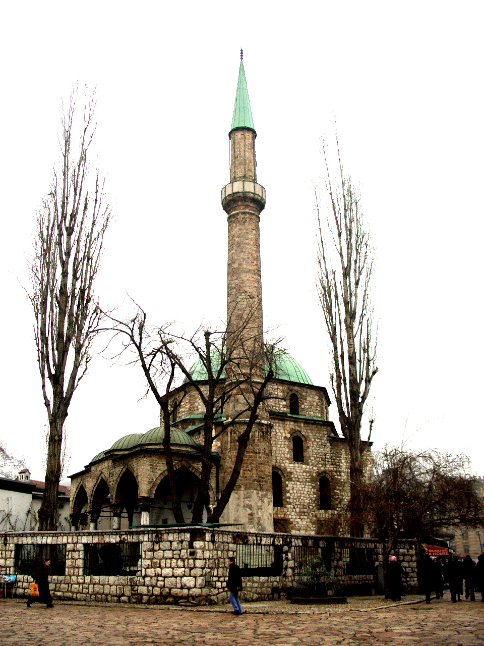 Baščaršija mosque in Sarajevo